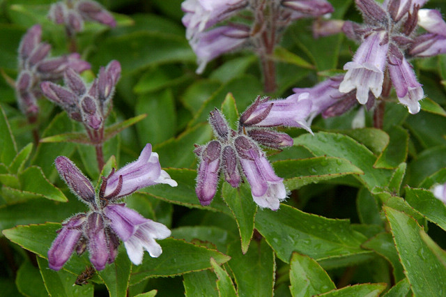 イワブクロ（北海道羅臼岳） Penstemon frutescens (Mt. Rausu, Hokkaido, JAPAN)